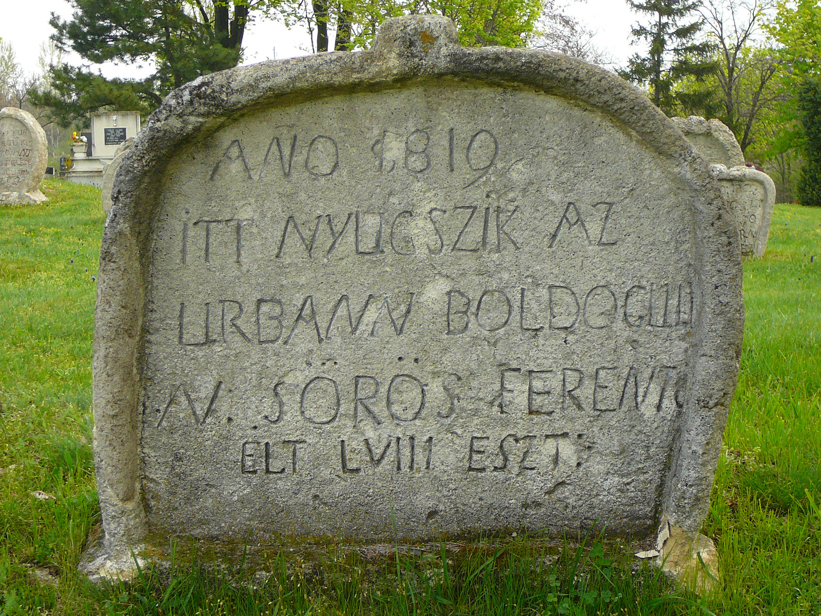 Népies sírkövek (Balatonudvari, Temető) This is a photo of a monument in Hungary. Identifier: 9770